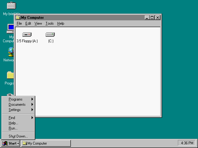 Schermata del desktop di Chicago build 81 in esecuzione su PCem.